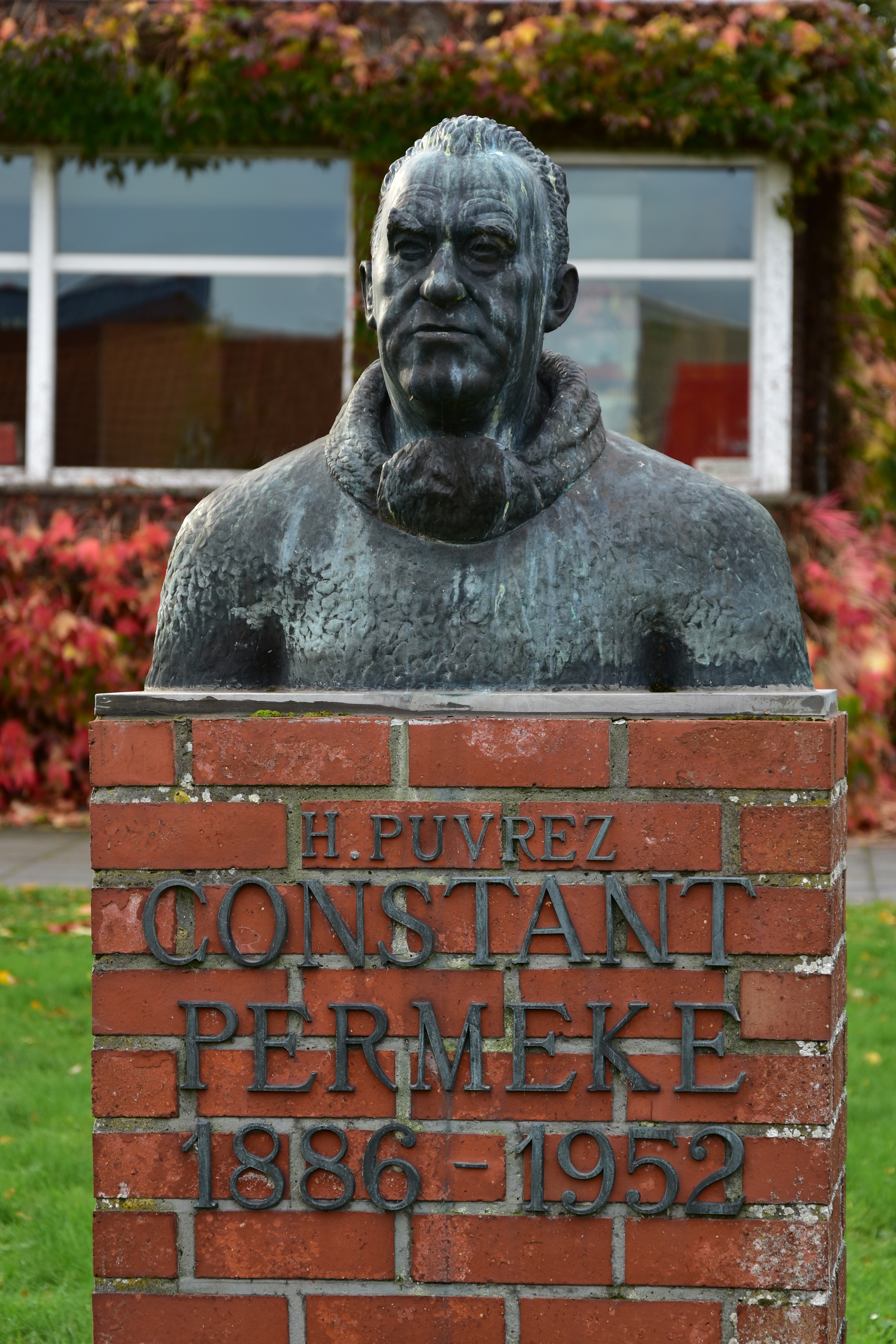 Henri Puvrez (1893-1971) Constant Permeke Jabbeke 27-10-2019 This photo of movable heritage has been taken in the Flemish Region